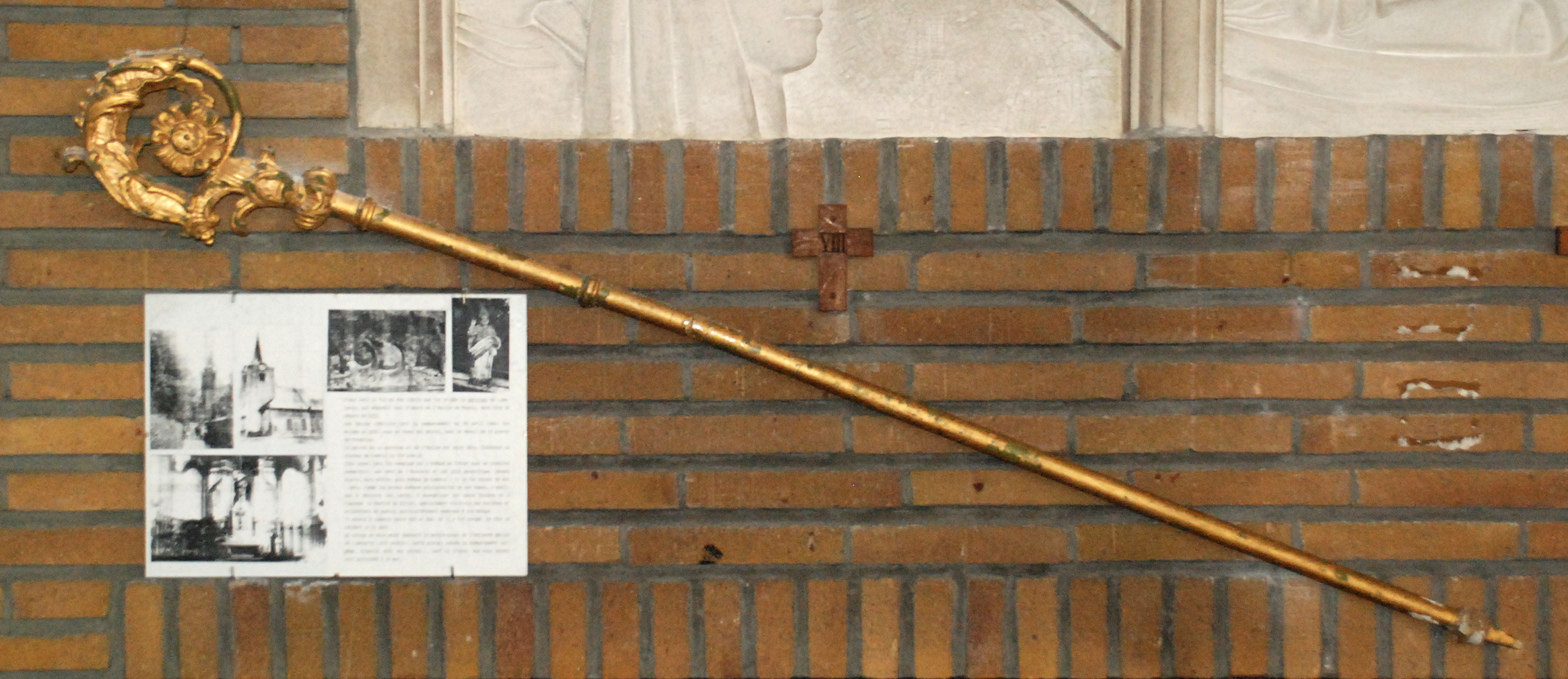 Belgique - Brabant wallon - Ottignies - Limelette - Église Saint-Géry